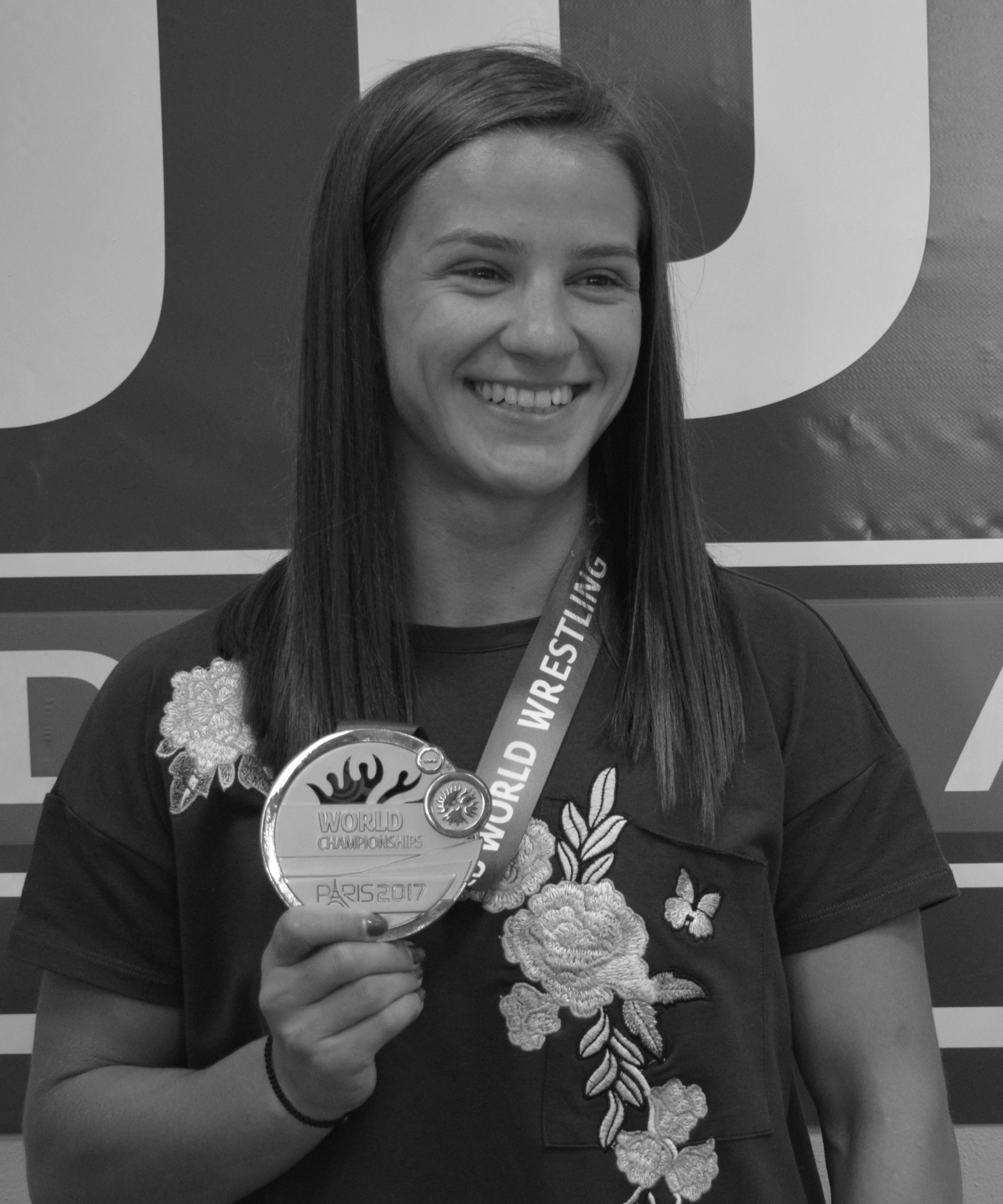 Alina Vuc, după cucerirea primei medalii din istoria luptelor feminine românești, la un Campionat Mondial de seniori. Performanța a fost realizată pe 24 august 2017, la Paris.